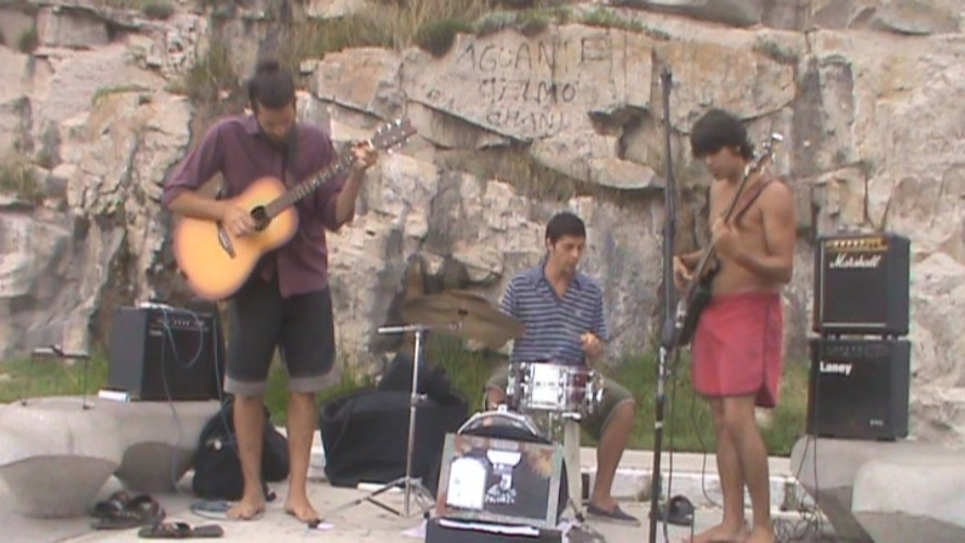 Vlad Tepes de gira por la costa atlántica, paseo El Torreón, Mar del Plata